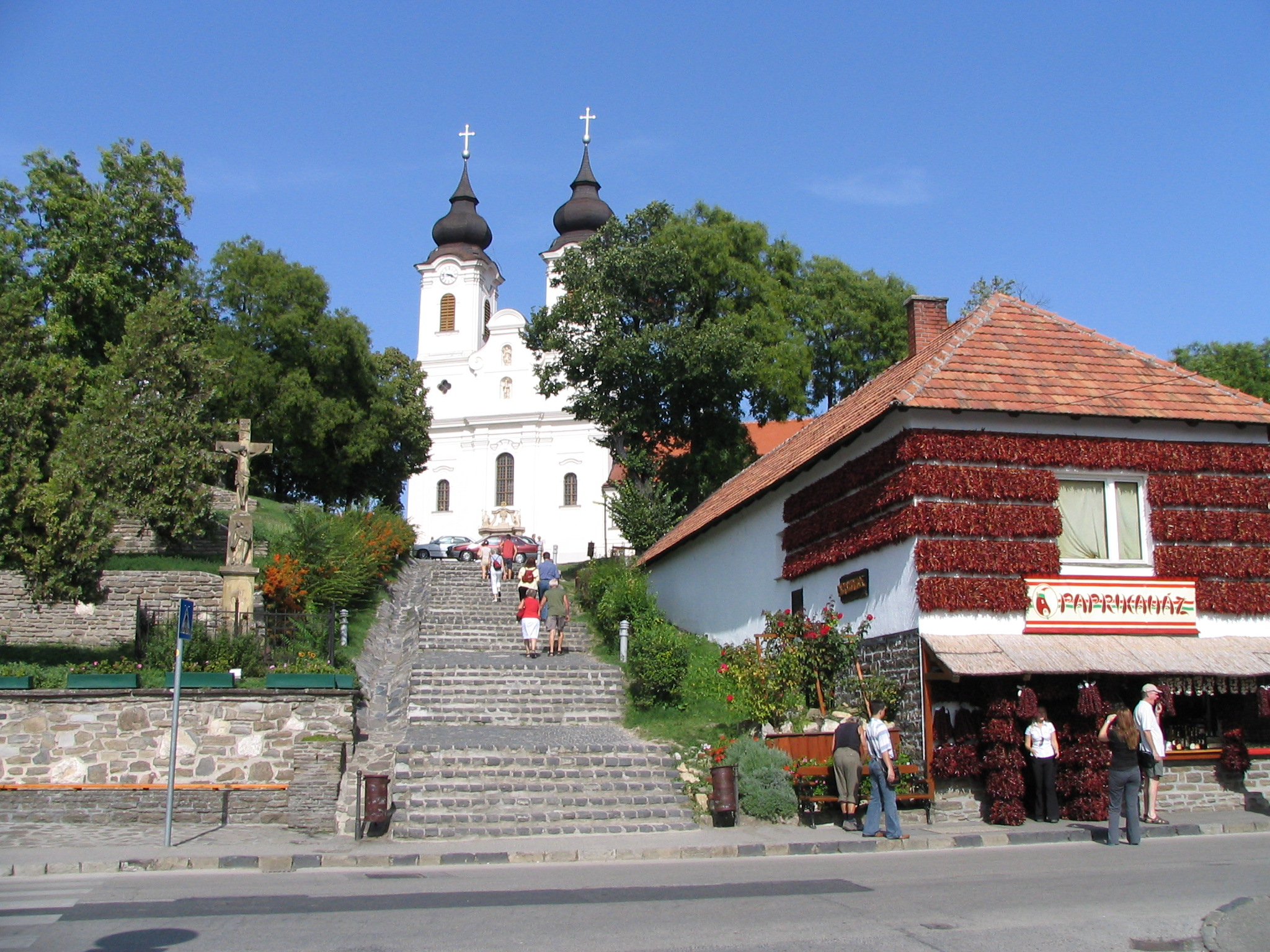 Tihany_abbey3